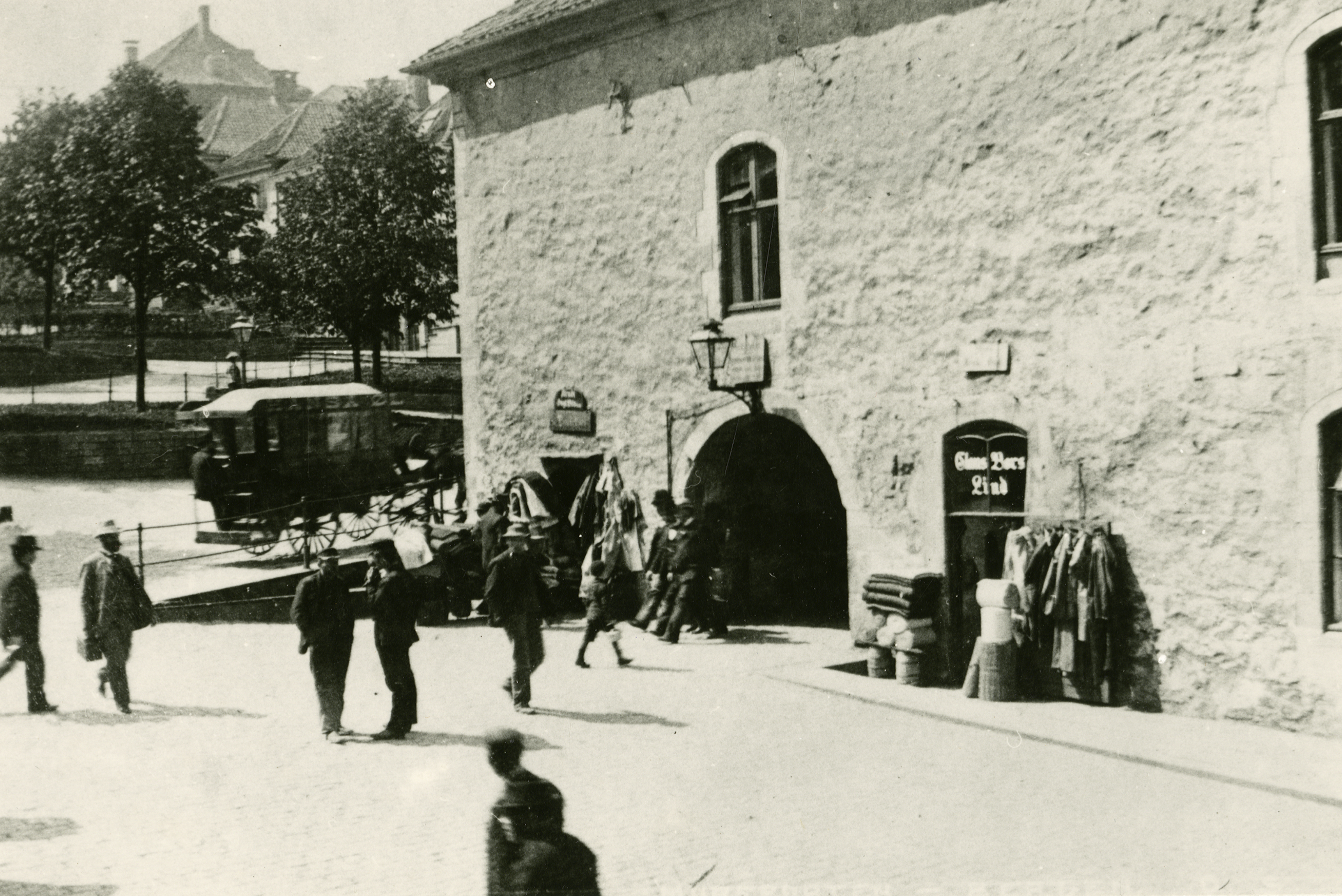 Muren i Bergen, Hordaland This image on crowdsourcing geotagging platform Fotodugnad